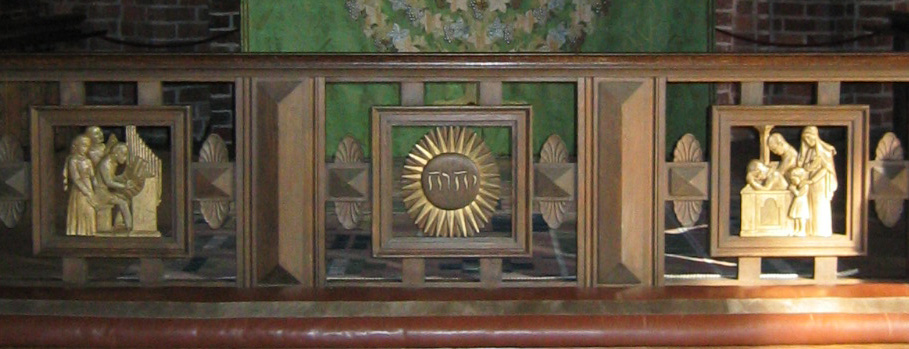 Altarskrank med tetragrammet JHWH i S:ta Maria kyrka, Helsingborg